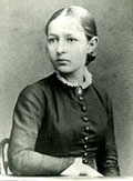 пианистка Зограф-Плаксина, Валентина Юрьевна